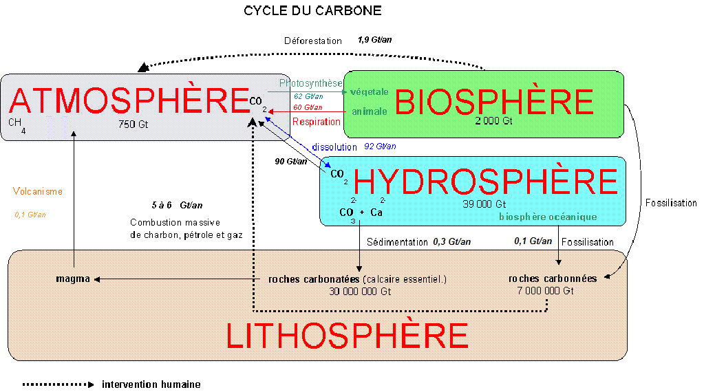 Cycle_carbone1